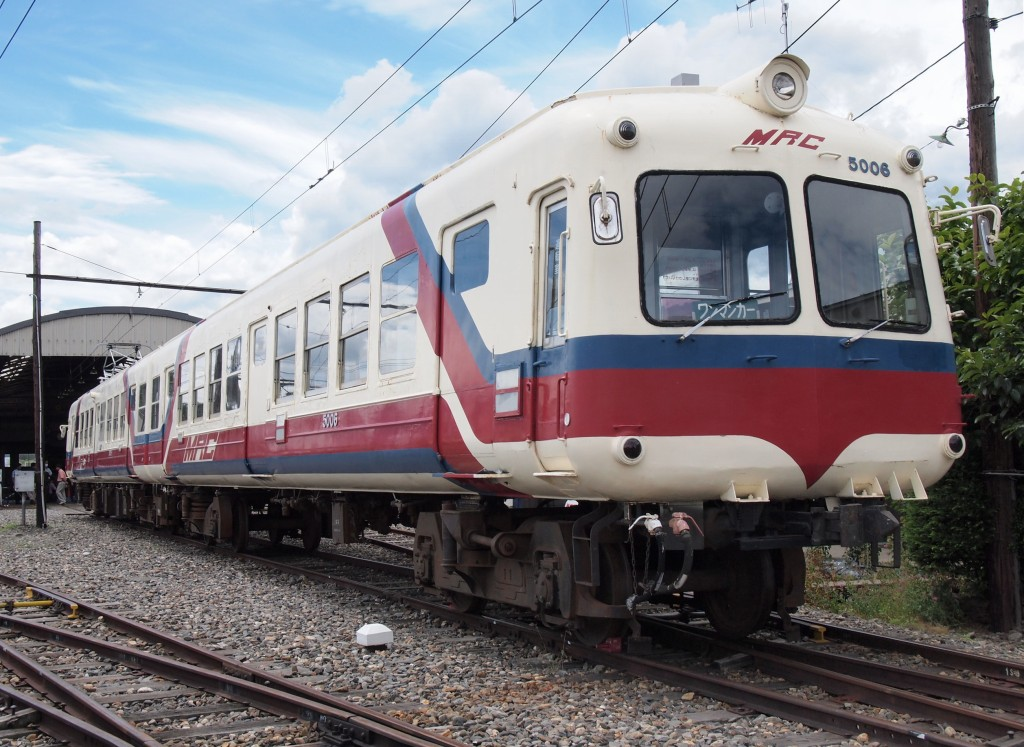 松本電気鉄道5000形電車(再塗装後)